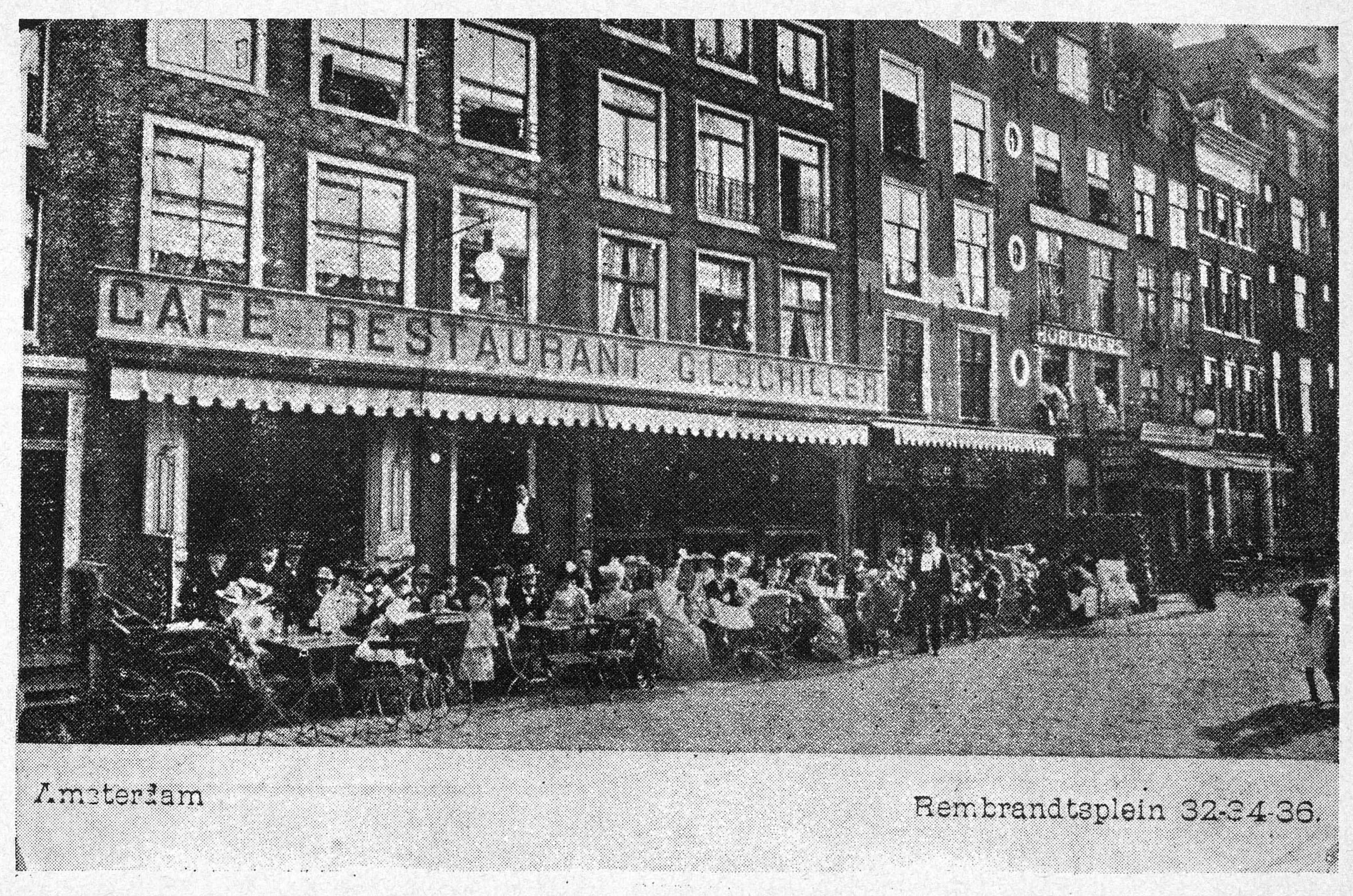 Photographed in Amsterdam between 1900 and 1914.